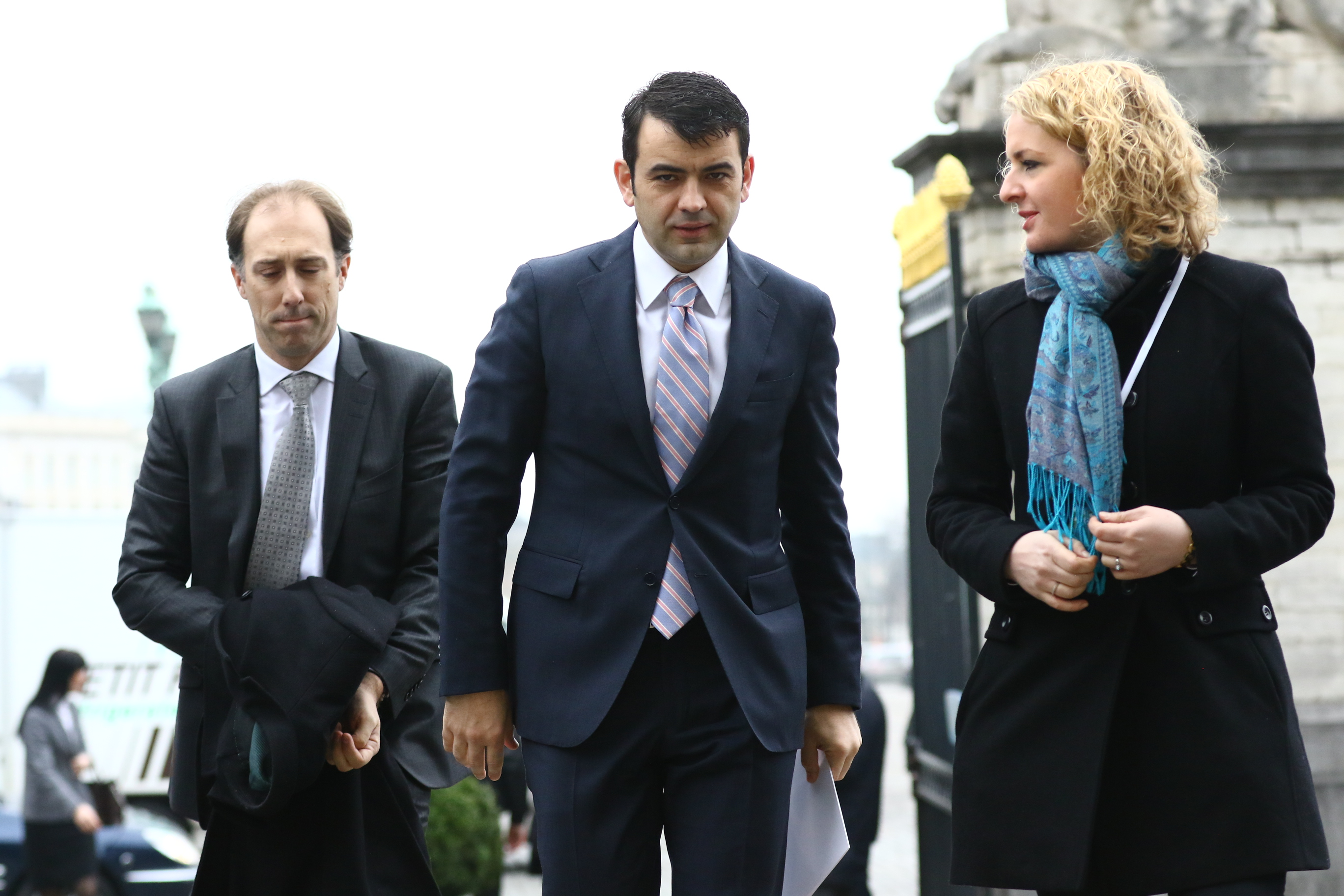 Gaburici - EPP Summit, March 2015, Brussels